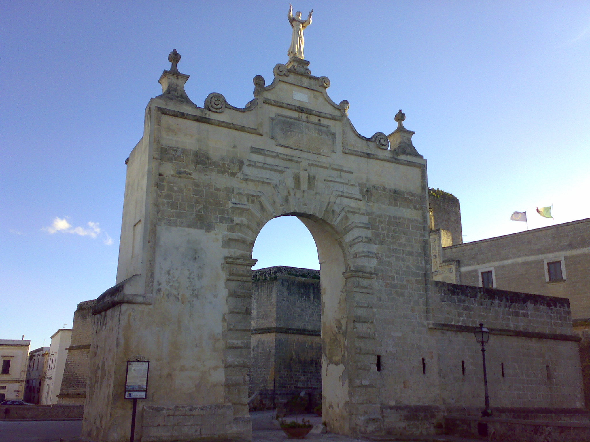 Porta San Giuseppe Copertino, Lecce